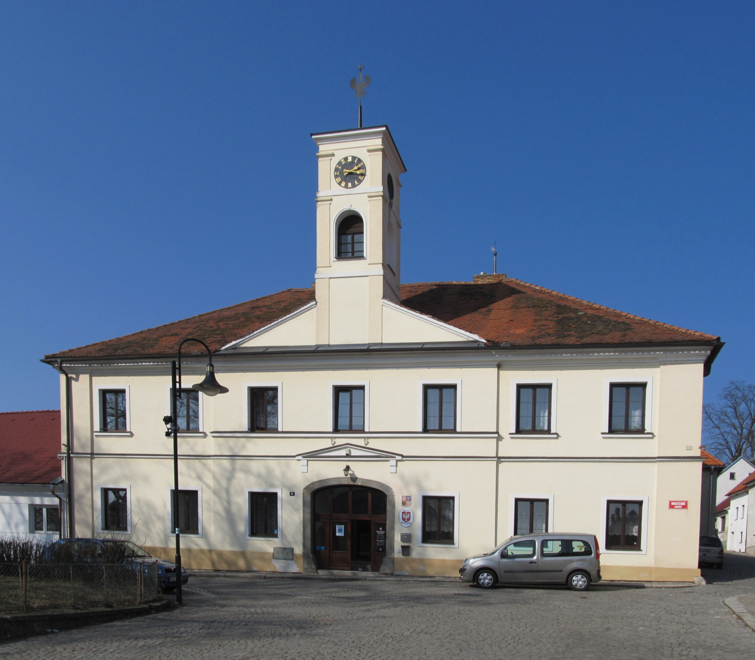 Radomyšl - radnice